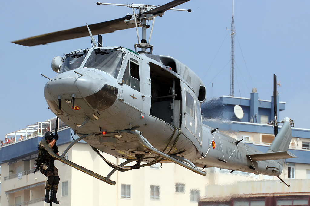 Festival de Cadiz 2012